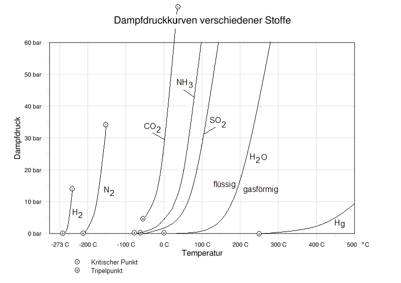 Dampfdruckkurven verschiedener reiner Stoffe